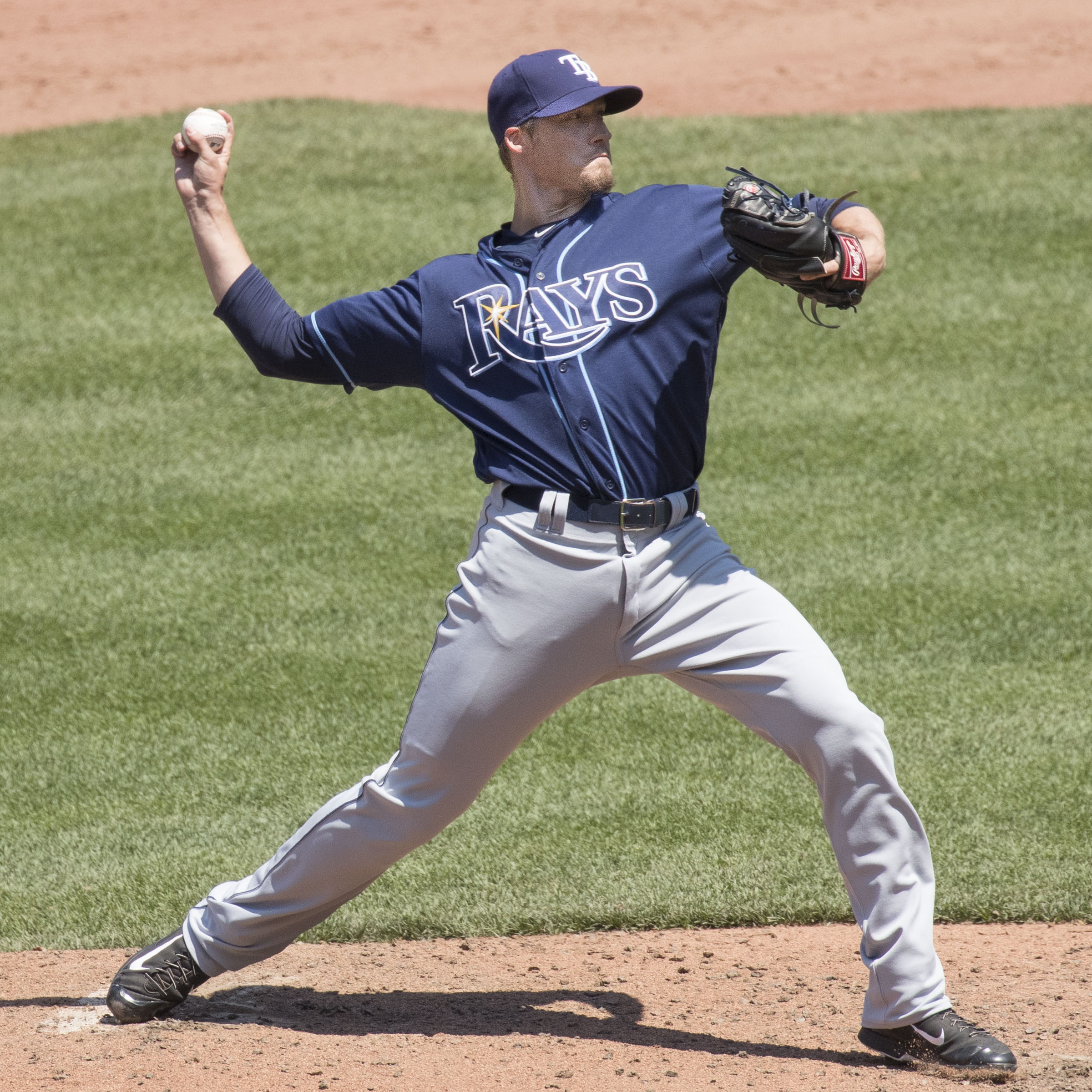 Tyler Sturdevant